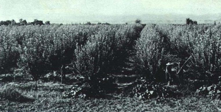 1964-11 1964年 秦岭北坡眉县苹果园